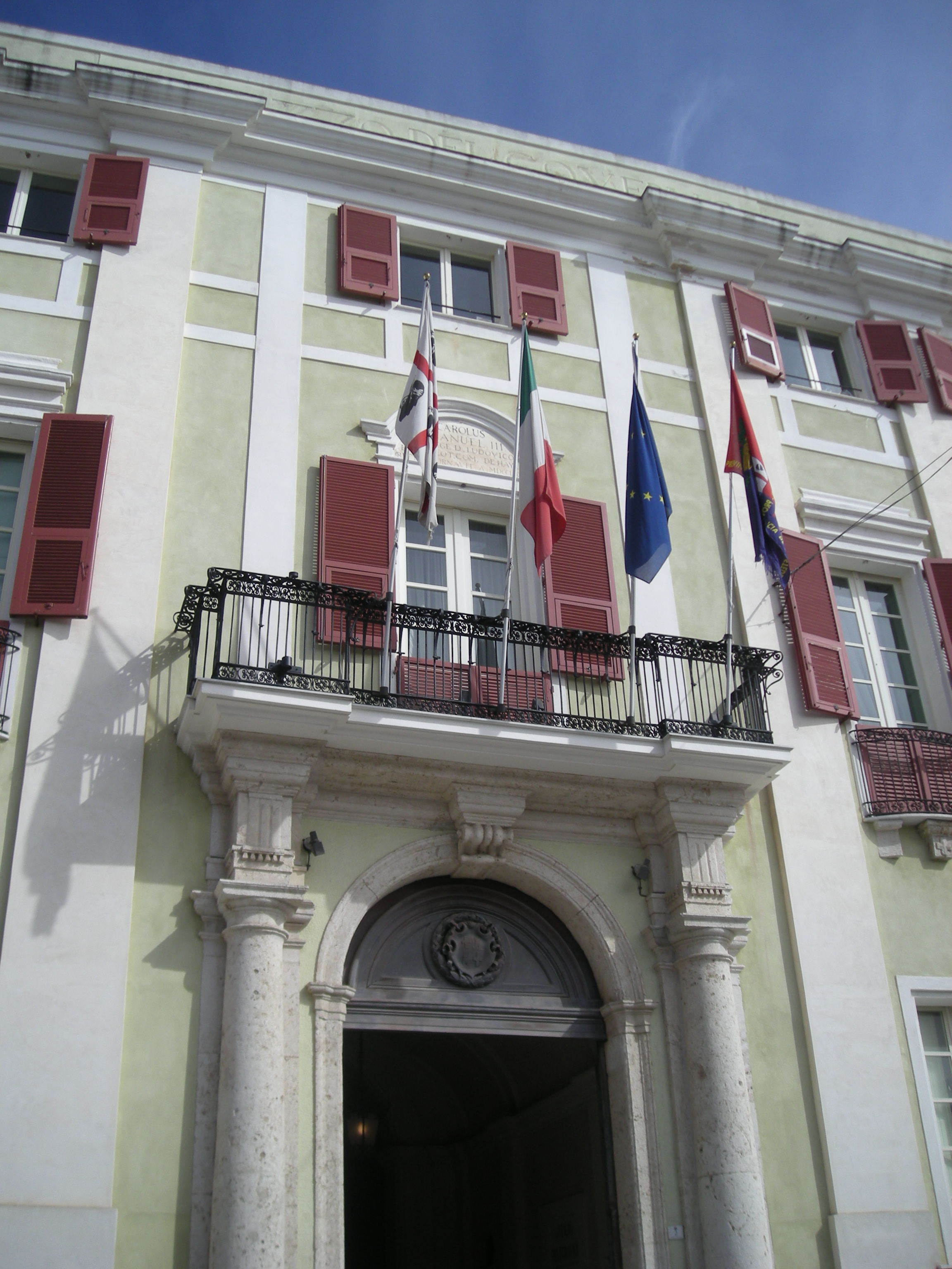 Ingresso del palazzo regio di Cagliari